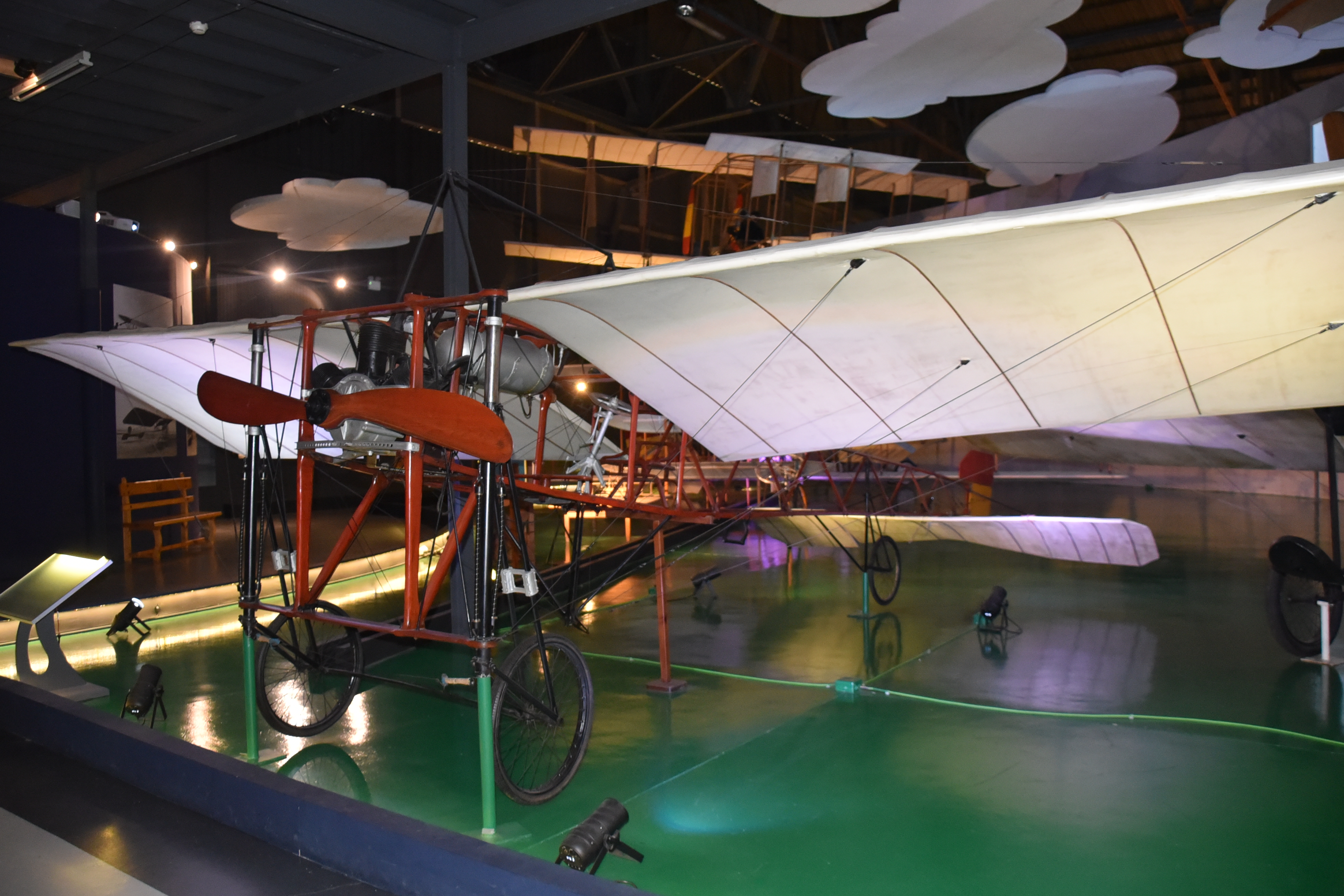 Monoplano monomotor Vilanova Acedo, basado en el Bleriot XI